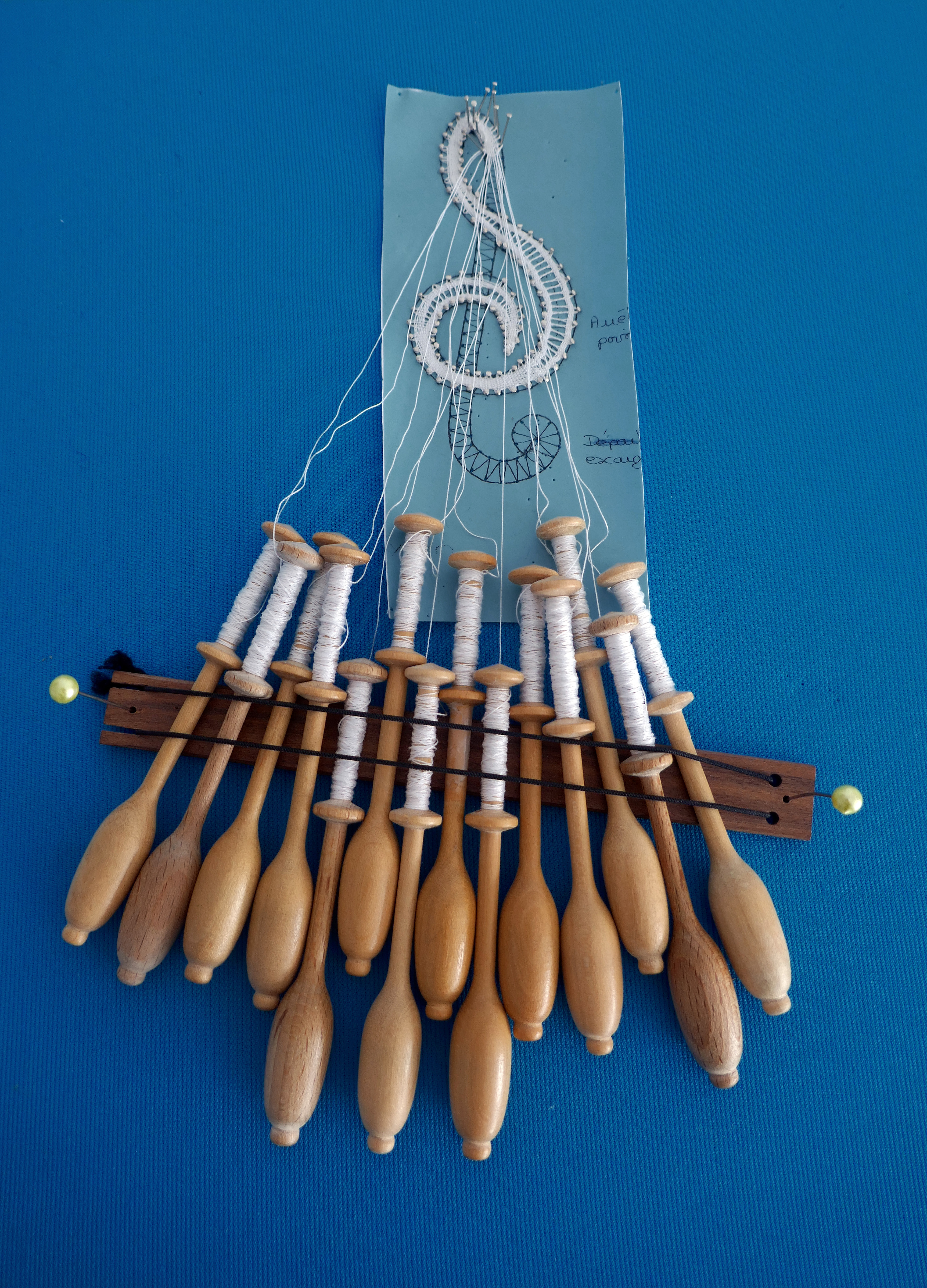 Dentelle aux fuseaux de Mirecourt (Vosges, France) Maison de la musique mécanique et de la dentelle à Mirecourt